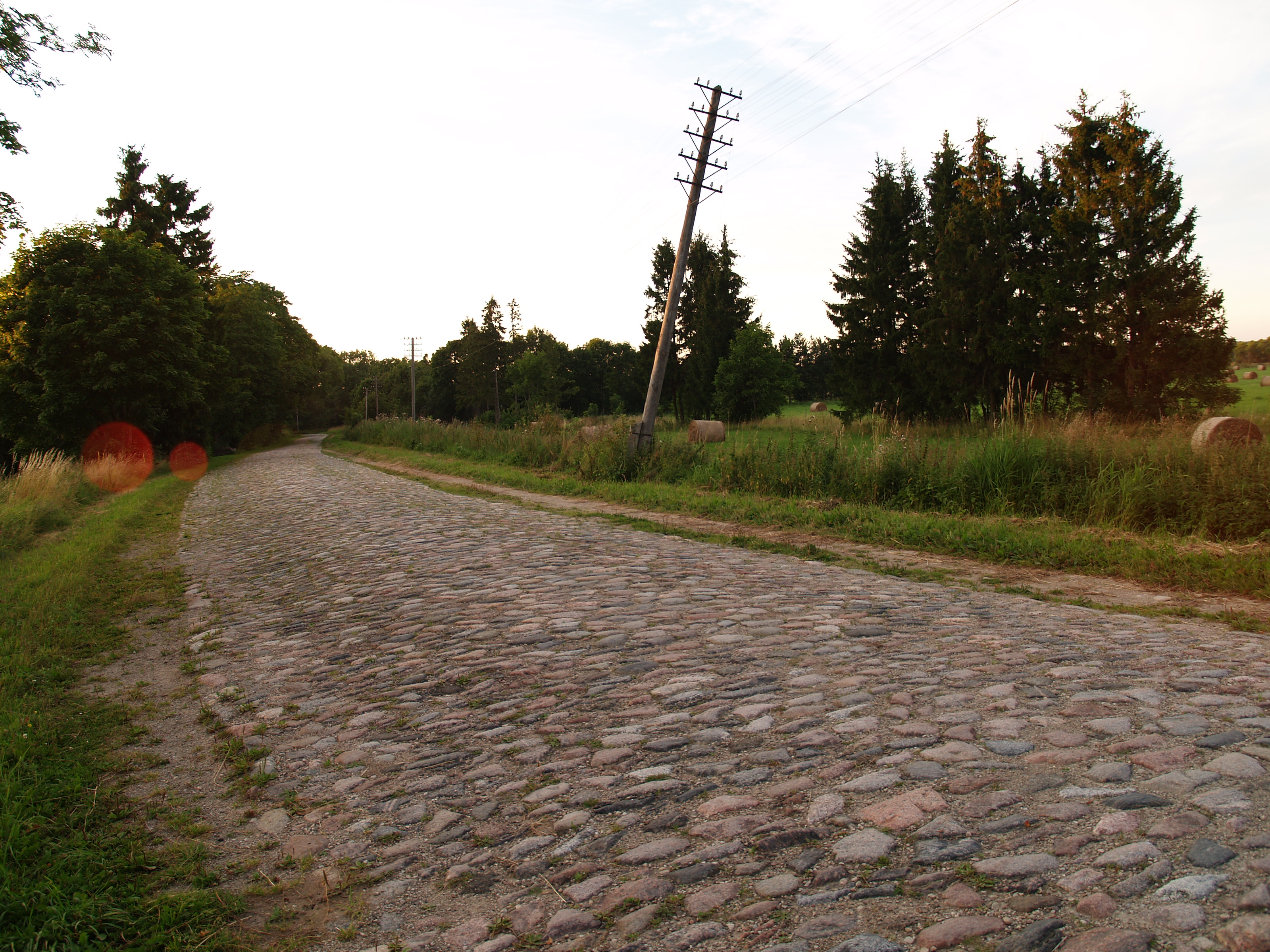 Levala küla munakivitee